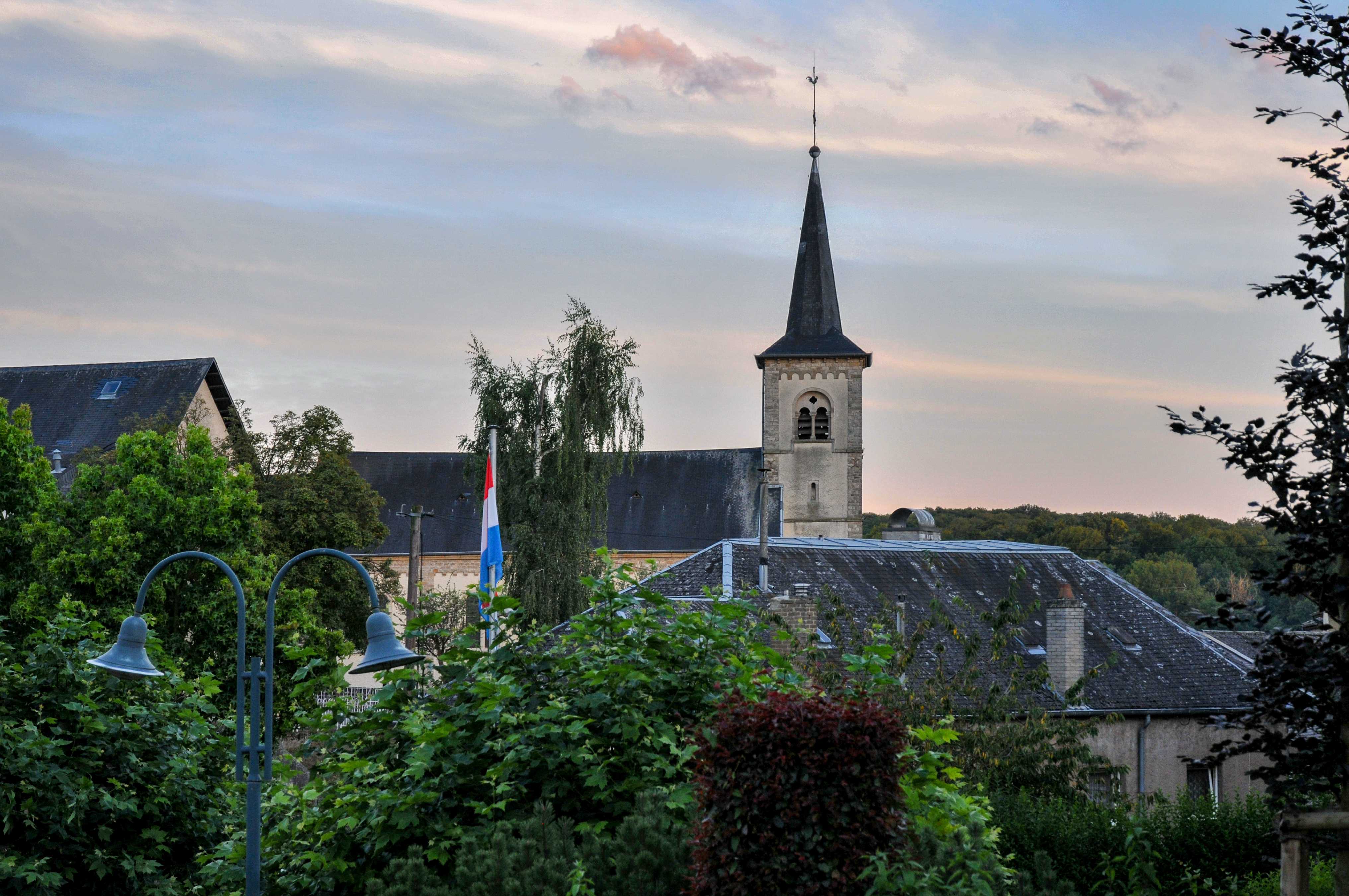 Vue op Altwis.